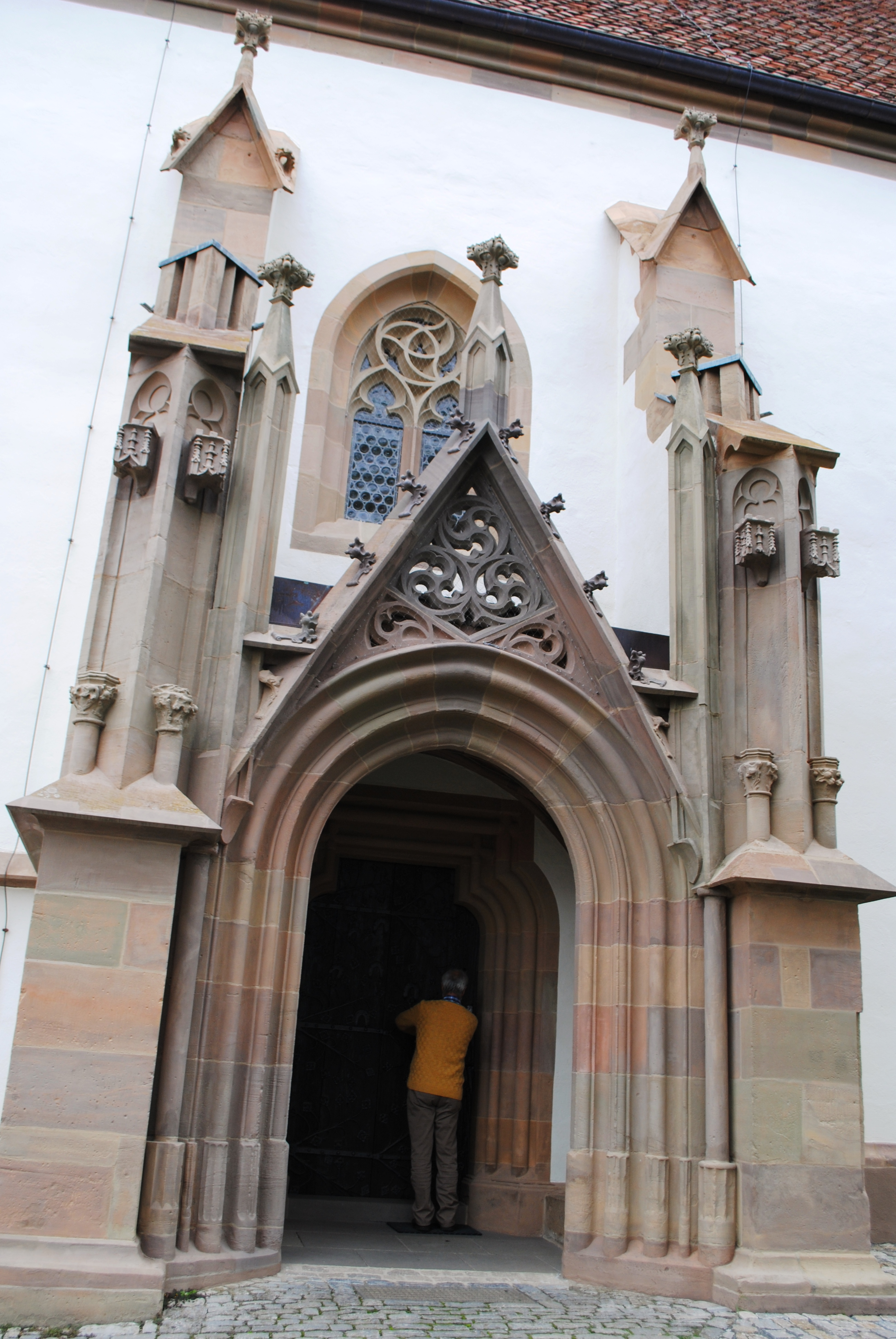 Südportal, Maria im Weingarten, Volkach